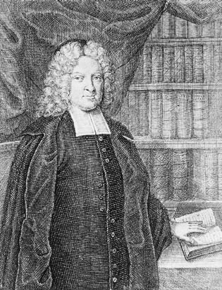 Herman Witte biskop i Åbo 1721-28.